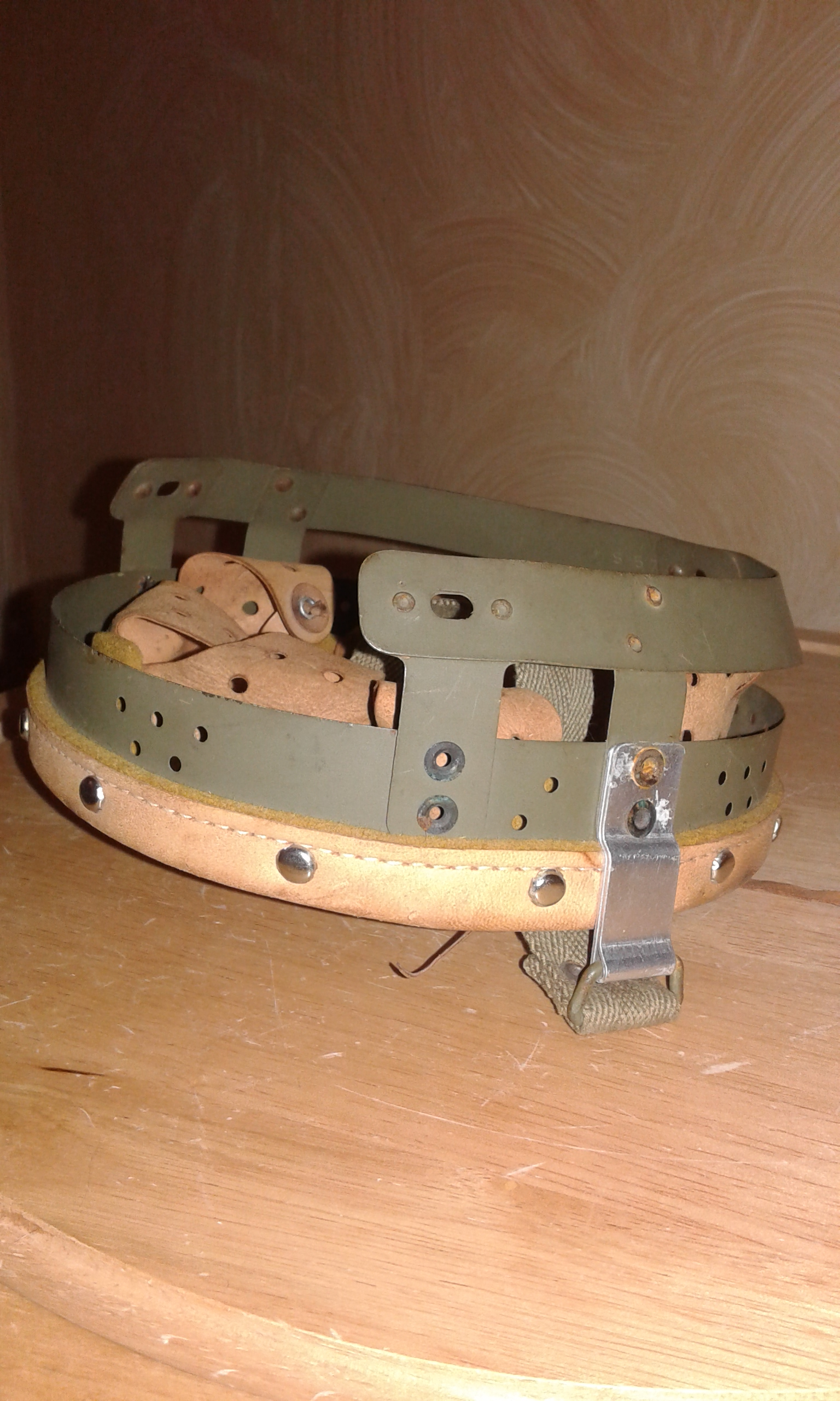 Da notare il sistema di fissaggio della cuffia nonché le molle di congiunzione, i fori di applicazione al guscio e le piastrine di alluminio che inglobando gli anelli reggisoggolo.